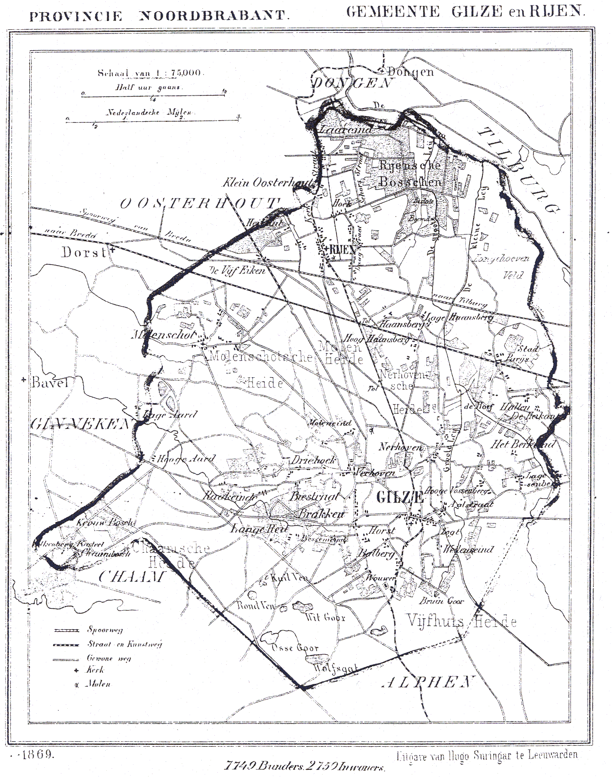 Nederland, Noord-Brabant, Gemeente Gilze-Rijen